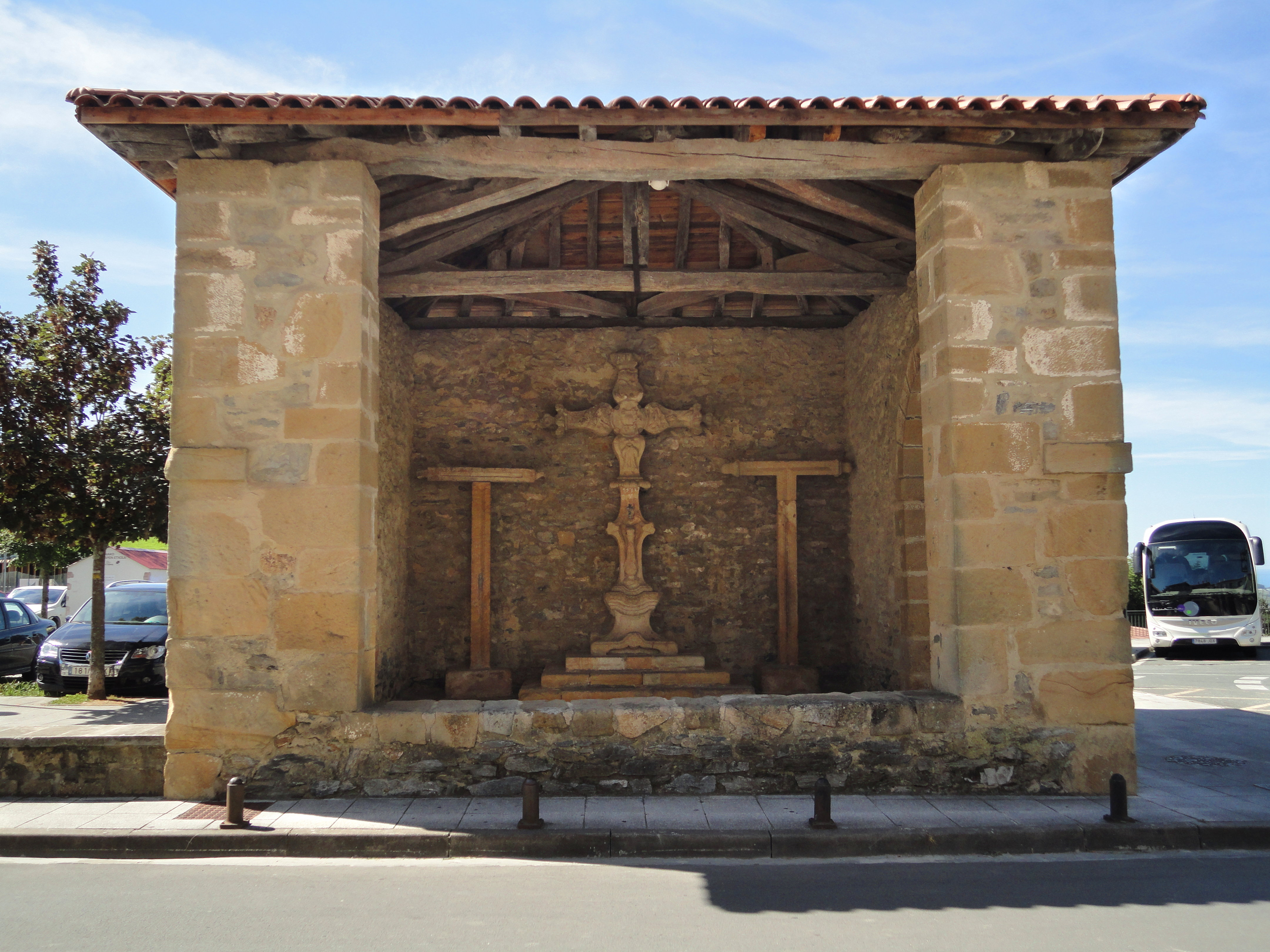 Gurutze santutxoa - Aia